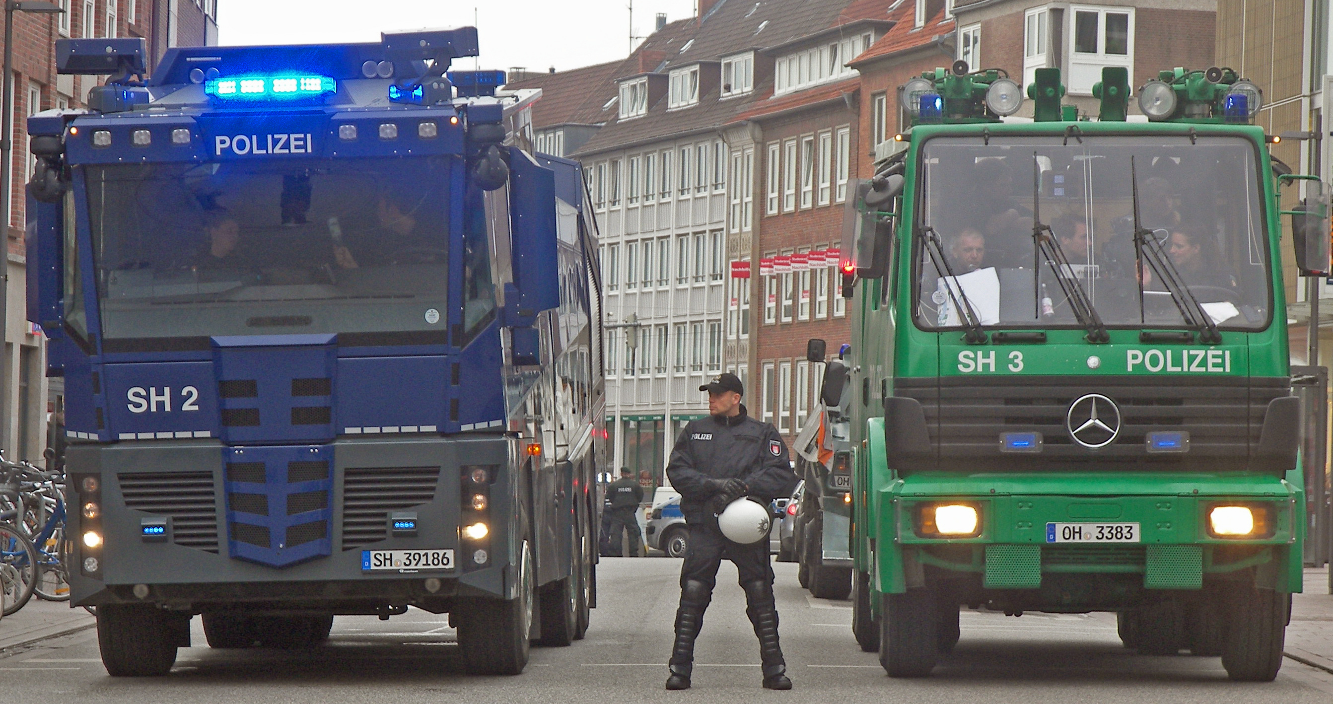 Anti-G7-Demo - Lübeck (Treffen der Außenminister): Wasserwerfer